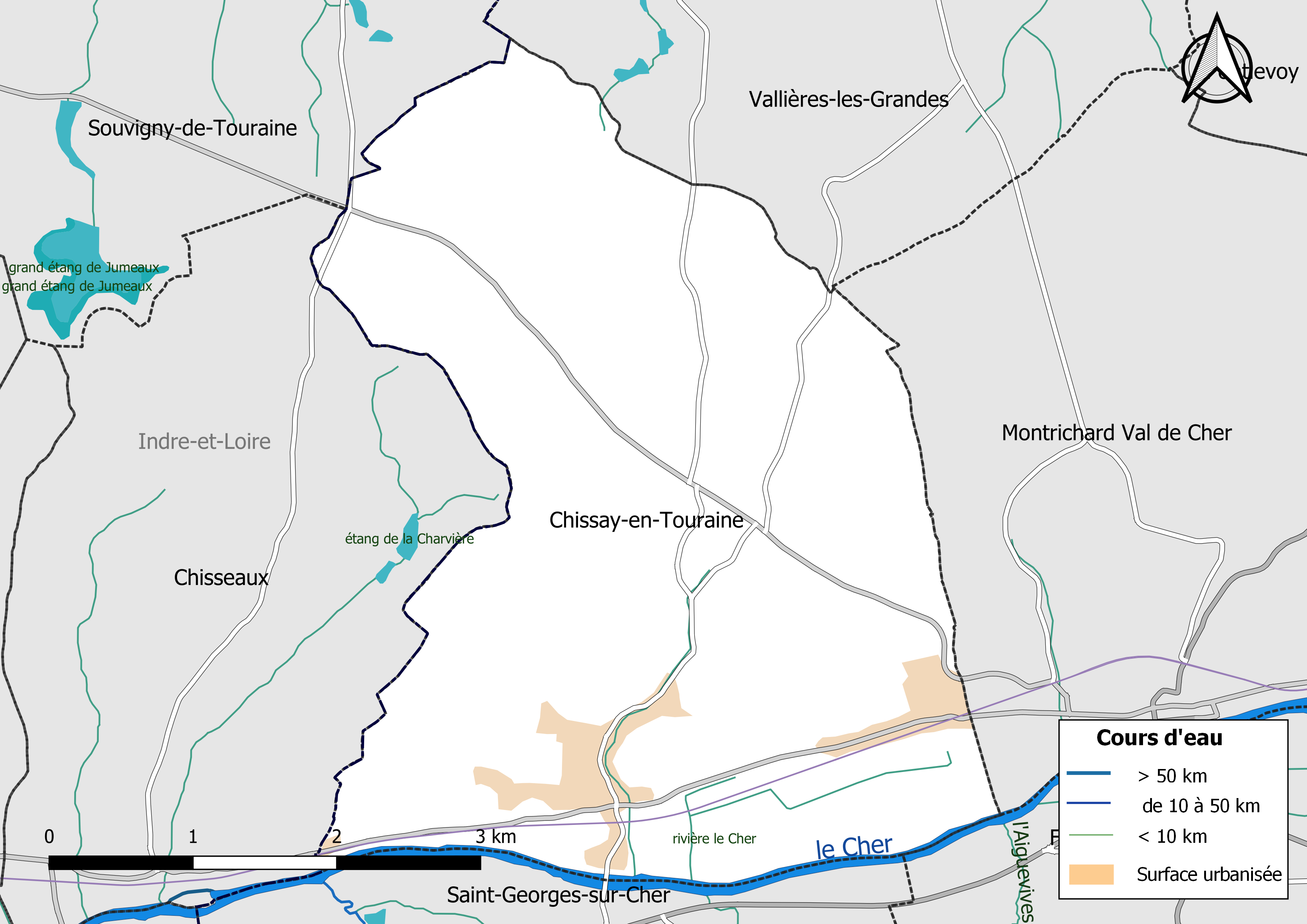 Carte du réseau hydrographique de la commune de Chissay-en-Touraine (Loir-et-Cher, France).